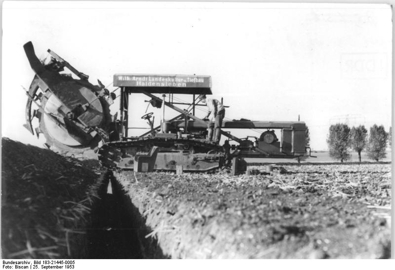 Eilsleben, Anlegen eines Entwässerungsgrabens Zentralbild Biscan 25.9.1953 1000 ha Kulturland werden gewonnen. Dank der grosszügigen Hilfe unserer Regierung, die bisher 680.000 DM zur Verfügung gestellt hat, kann der sogenannte Seeische Bruch in der Höhe von Eilsleben trockengelegt werden. Zu diesem Zweck werden 70 cm tiefe Gräben durch den ganzen Bruch gezogen und Drainröhren in einer Gesamtlänge von 610 ha gelegt. Durch diese Binnenentwässerung werden 1000 ha Moorwiesen, die mehr als 400 Bauern und Volksgütern der Umgeburg gehören, in fruchtbaren Ackerboden verwandelt. UBz: Die riesige Bodenfräse der Haiderslebener Privatfirma Wilhelm Arndt, die in der Stunde einen 70 Zentimeter tiefen Graben bis zu 280 Meter Länge ausfräst. Diese Maschinen - die Konstruktion eines Ingenieurs der Magdeburger Hochschule für Schwermaschinenbau - leistet die Arbeit von 100 Menschen. In Deutschland gibt es keine zweite solche Maschine.